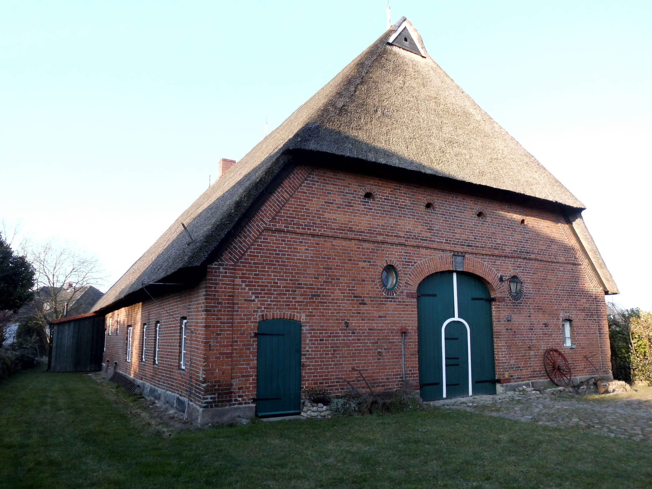 Fachhallenhaus in der Dorfstraße 29, Schönkirchen (bei Kiel)